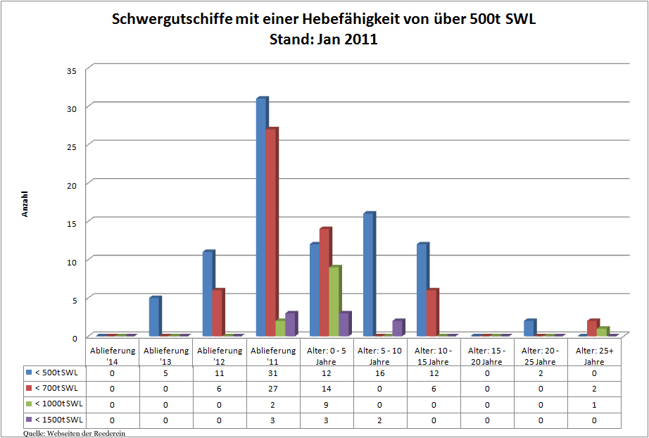 Globale Schwergutflotte Stand Jan. 2011